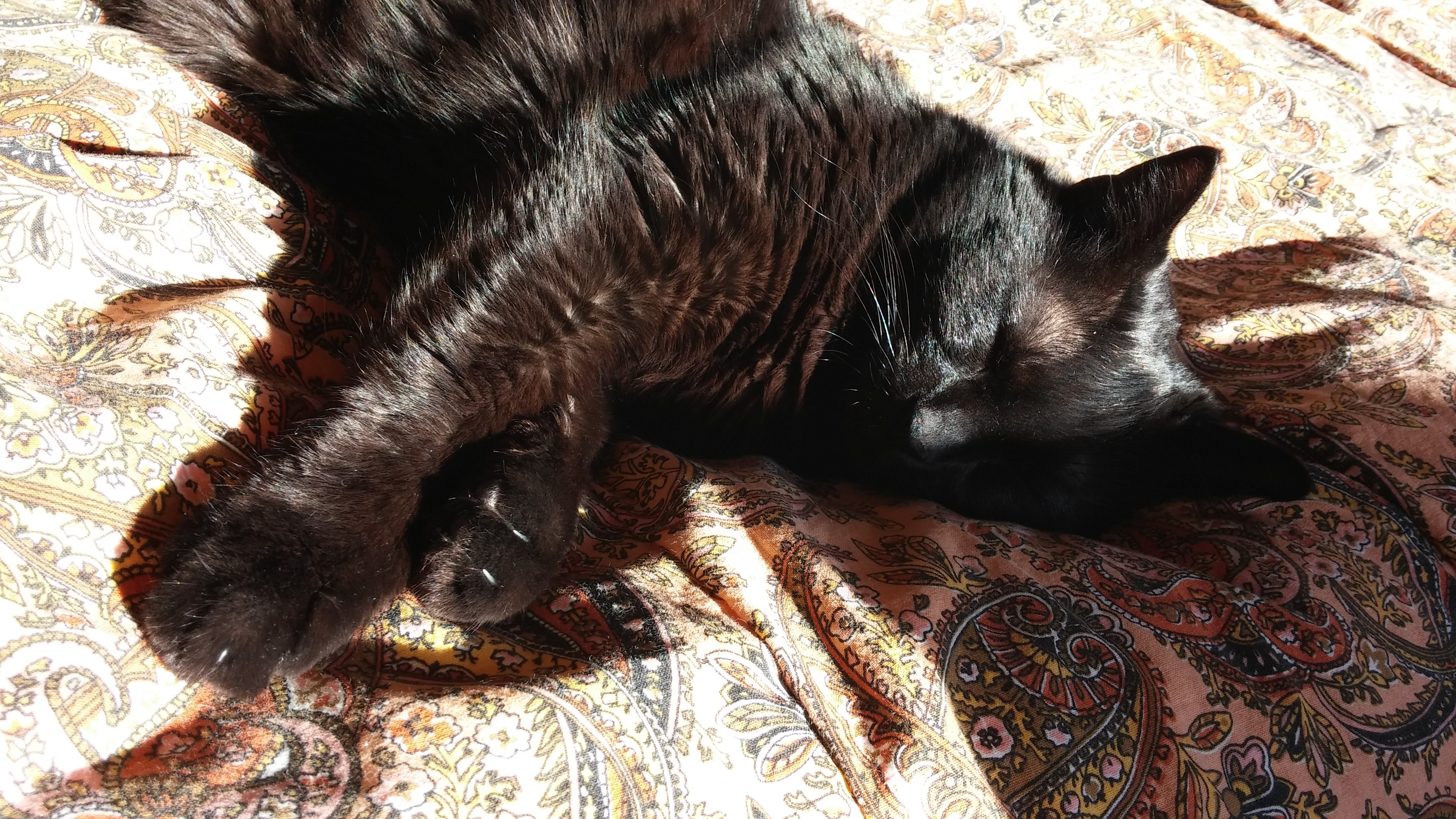 rjavkaste proge črne mačke, opazne na soncu; Ljubljana, Slovenija